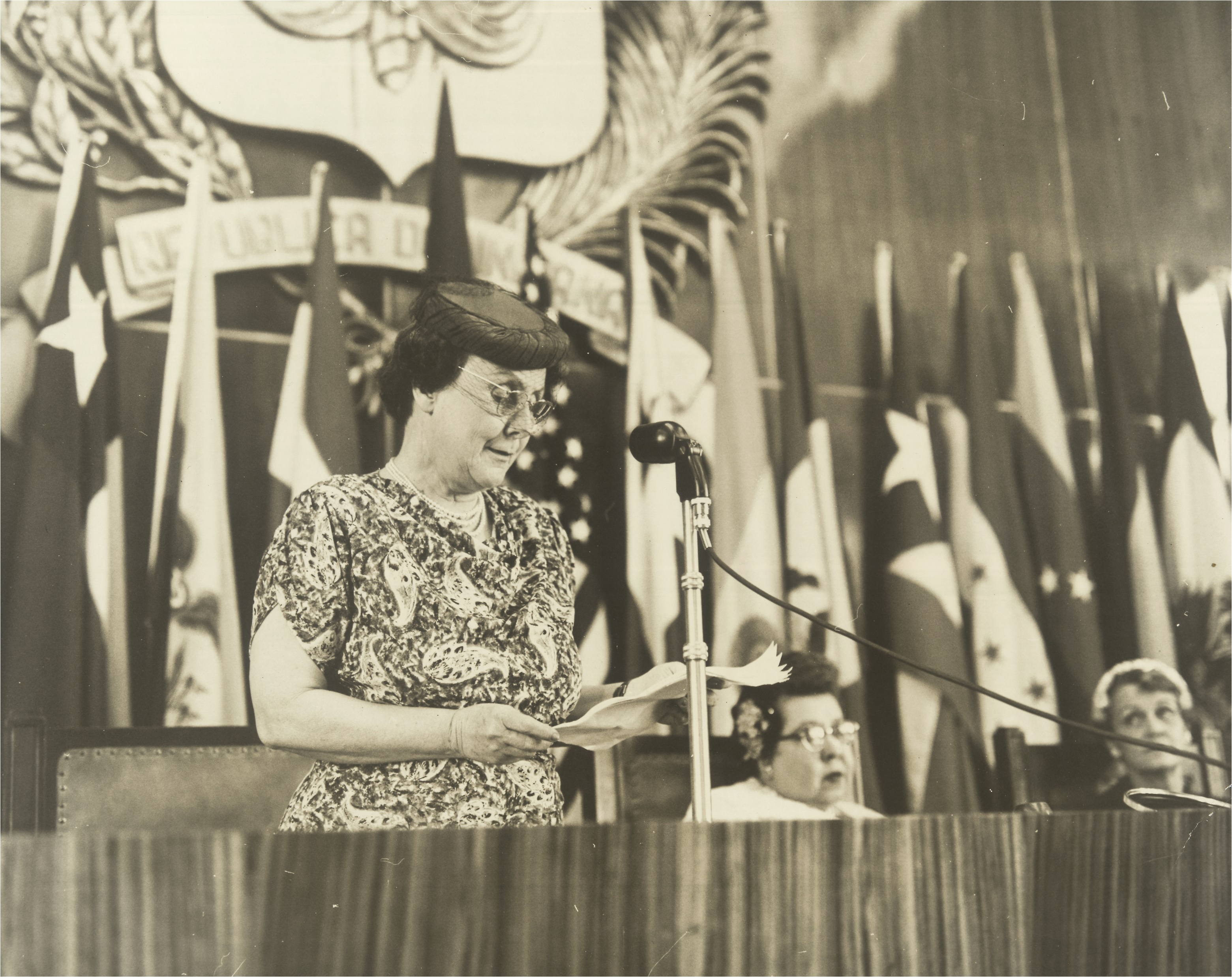 Bertha Lutz discursa no encerramento da XI Assembleia da Comissão Interamericana de Mulheres, em Trujillo, República Dominicana. Fundo: Federação Brasileira pelo Progresso Feminino.